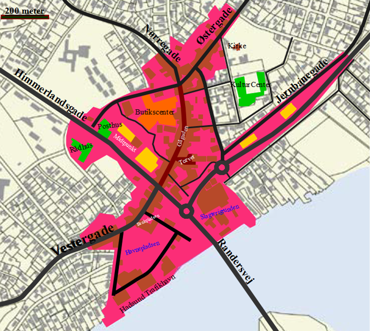 Hadsunds bymidte eller Hadsund Centrum.